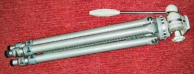 Stativ Gitzo Gilux Reporter